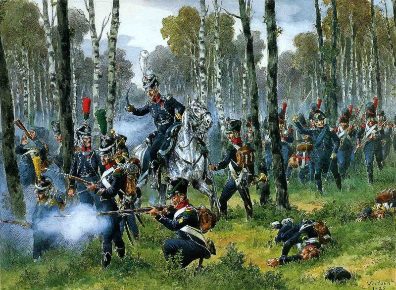 Une compagnie d'infanterie légère française dans les bois.